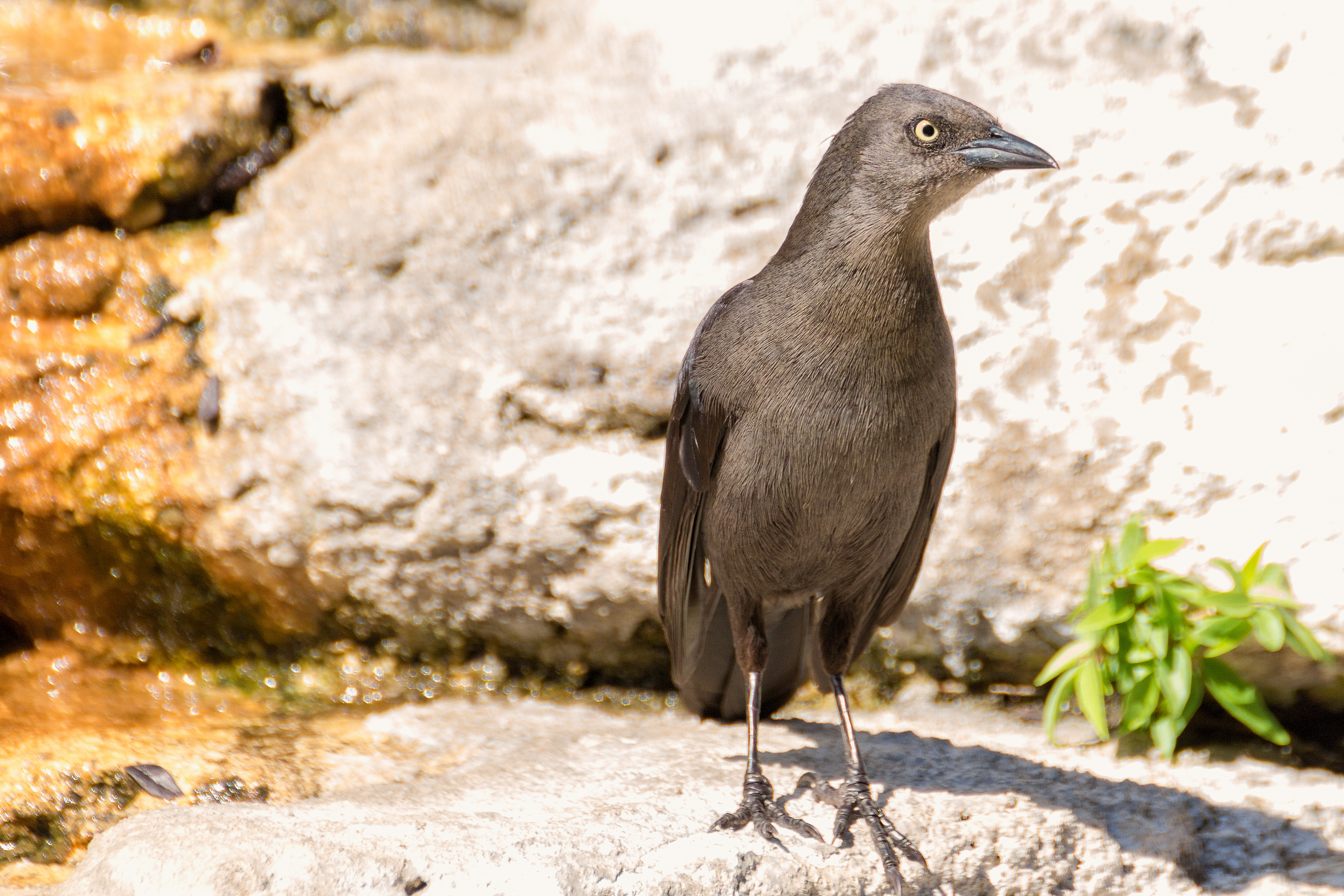 Carib Grackle | Tordito (Quiscalus lugubris) (♀), Caracas, Venezuela